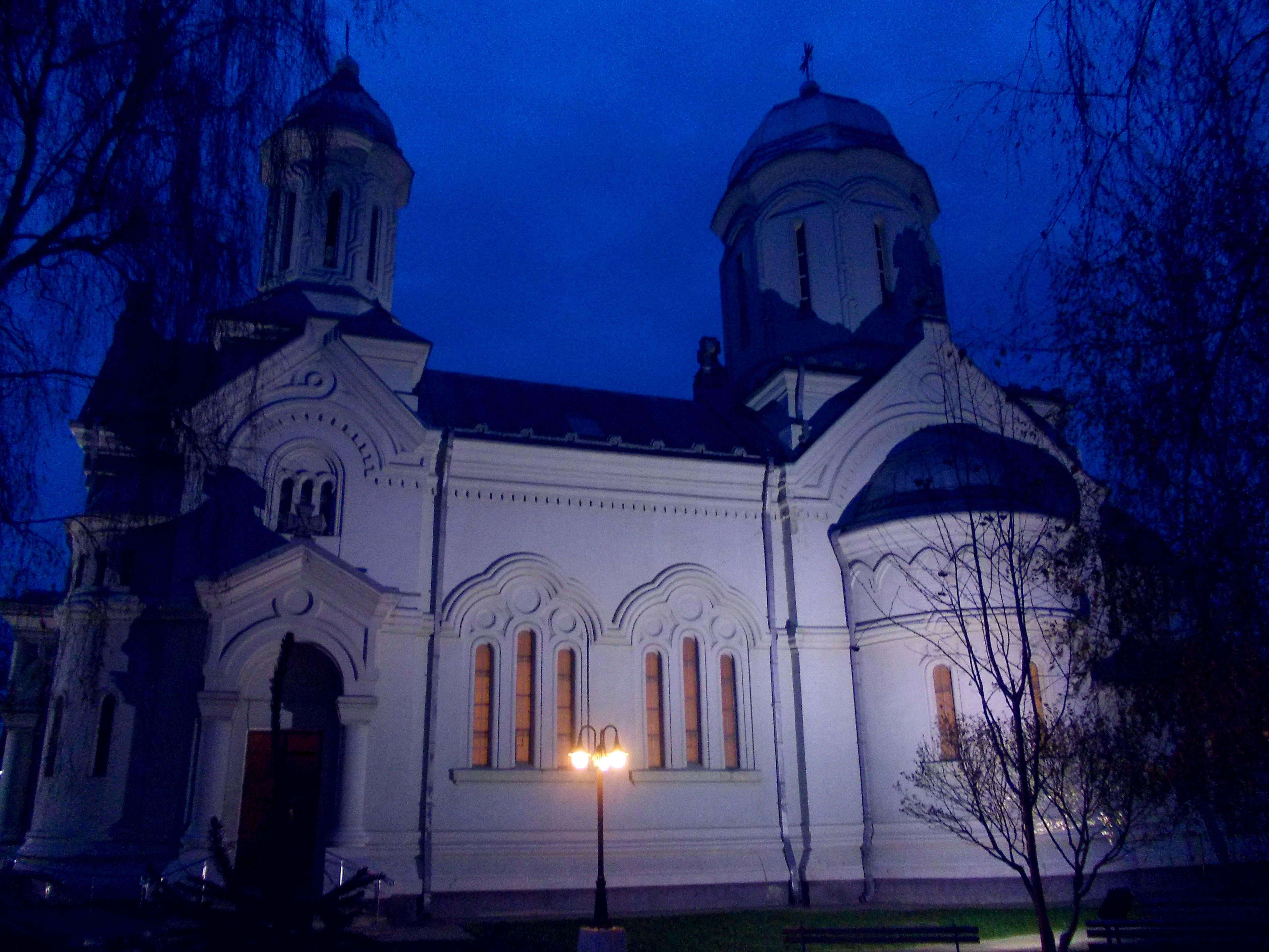 Biserica catolică Sfânta Tereza a pruncului Iisus Roman